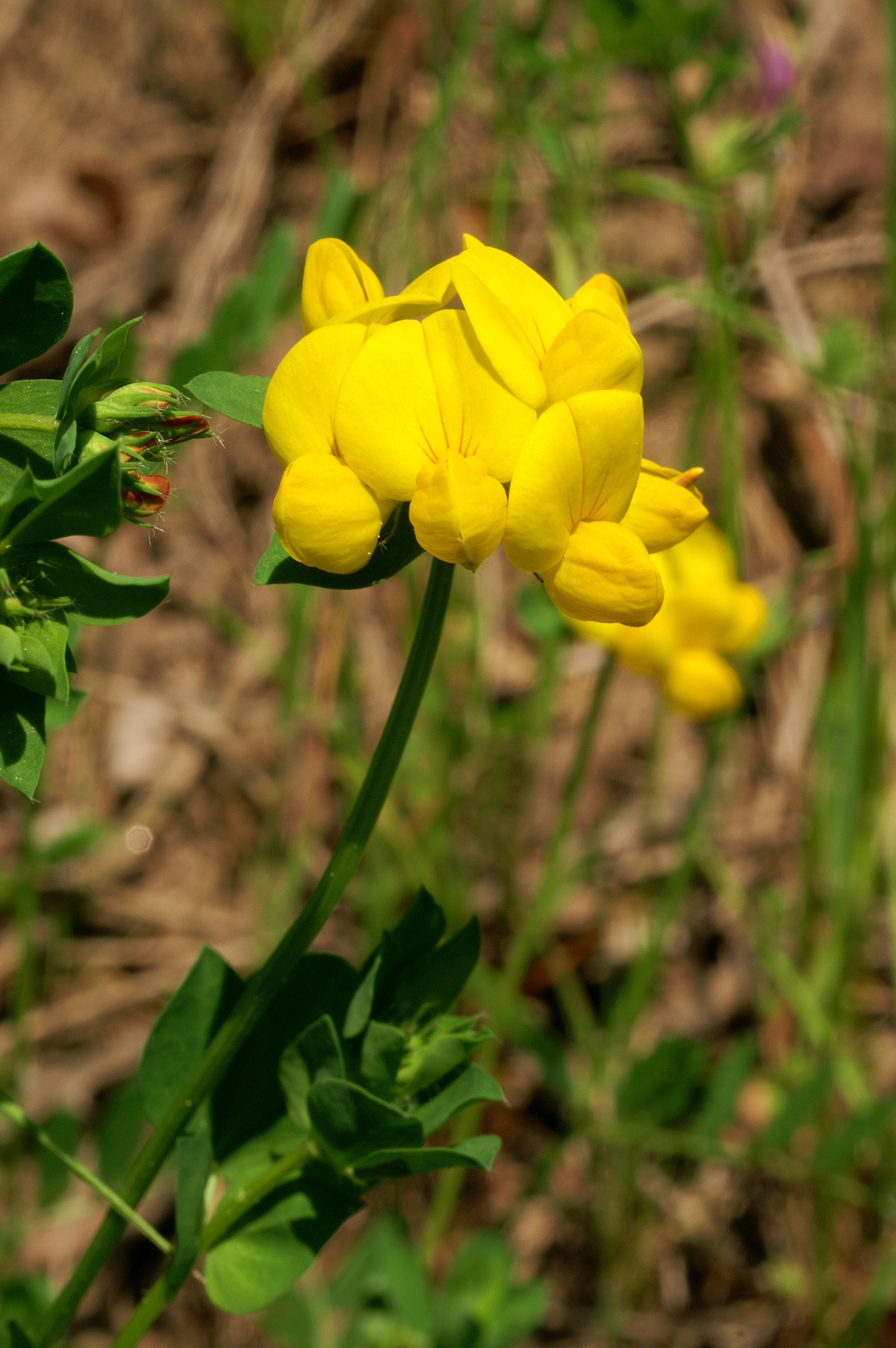 Blütenstand des Wiesenhornklees (Lotus corniculatus), Saarbrücken, Saarland, Deutschland.